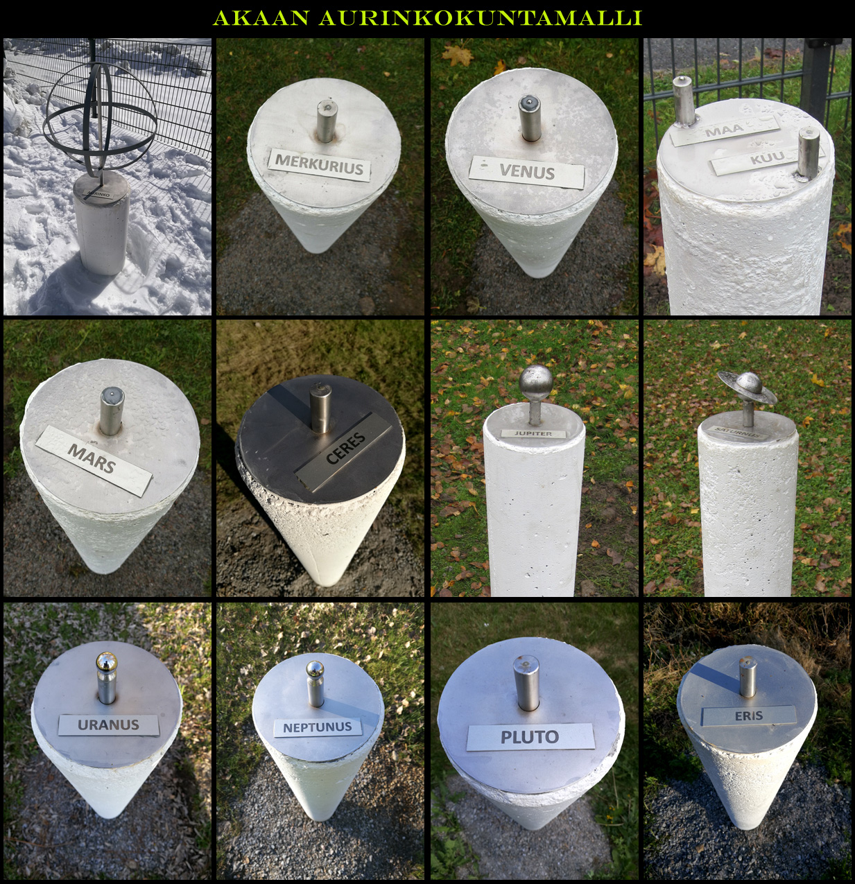 Akaan aurinkokuntamallin planeettapilarit